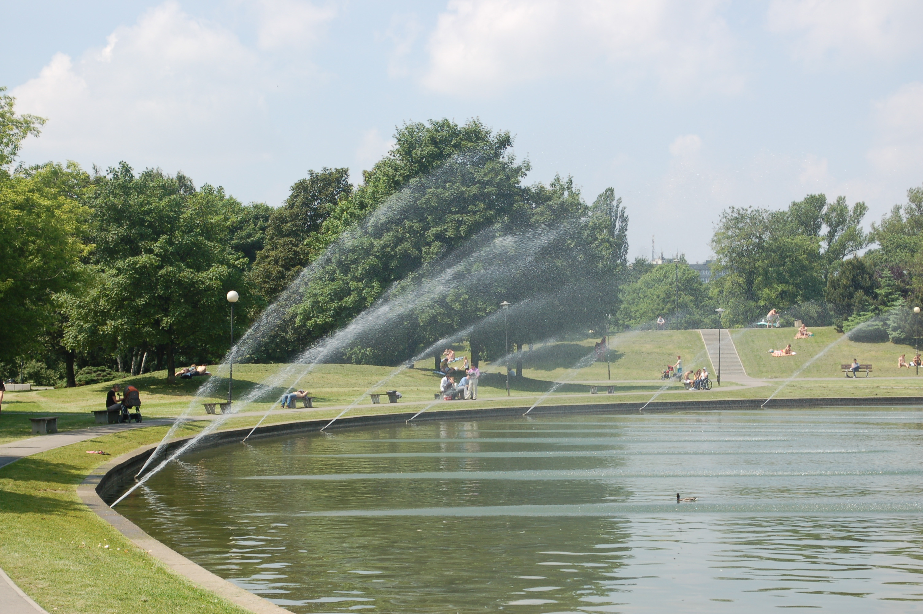 Pole Mokotoskie, Warschau